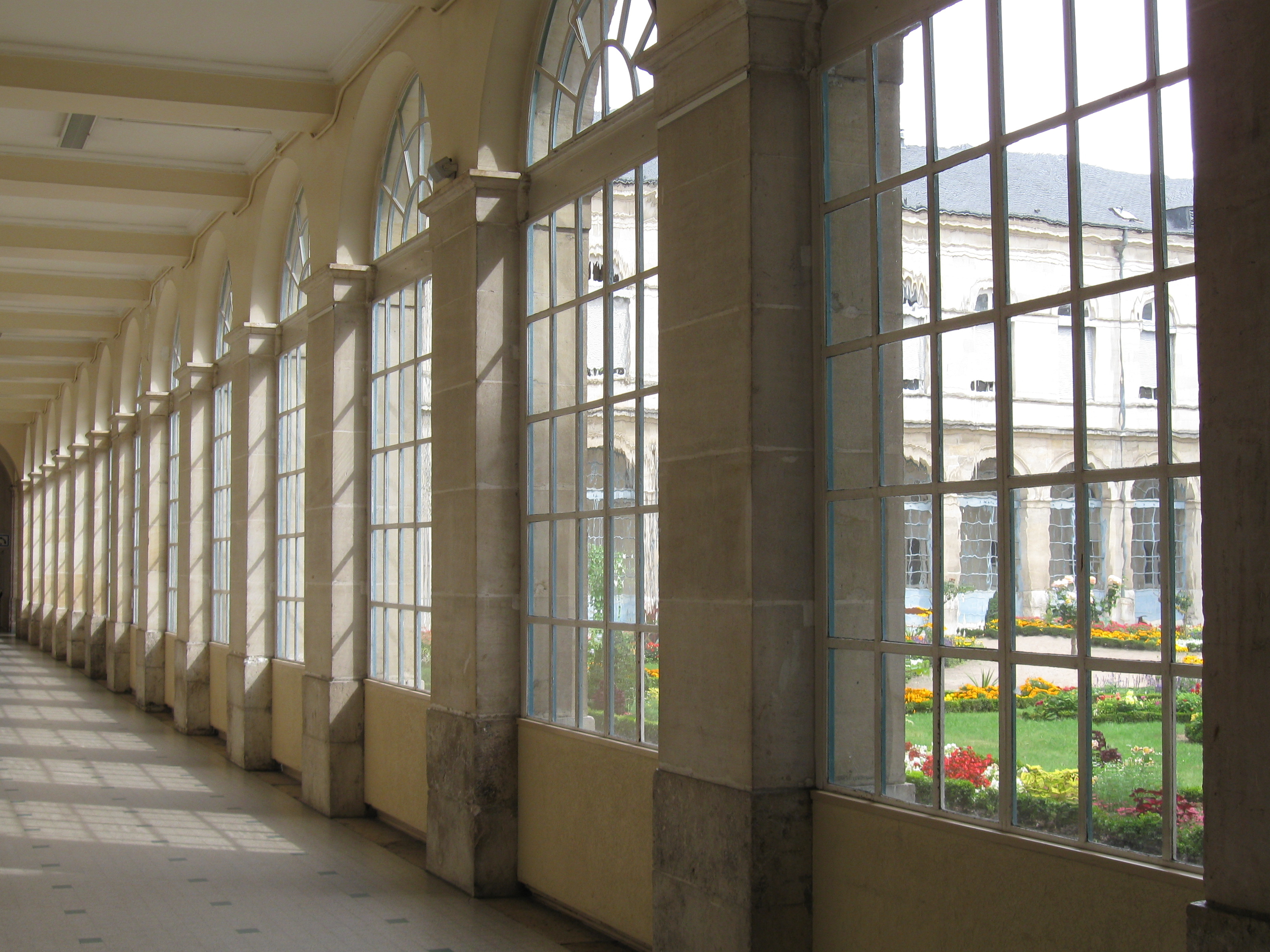 Hôpital Porte Madeleine, Orléans, Loiret, France